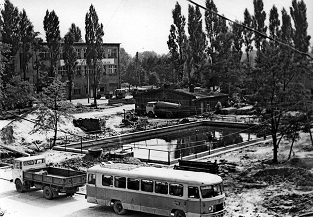 Rozbudowa zakładu. 1970 rok.